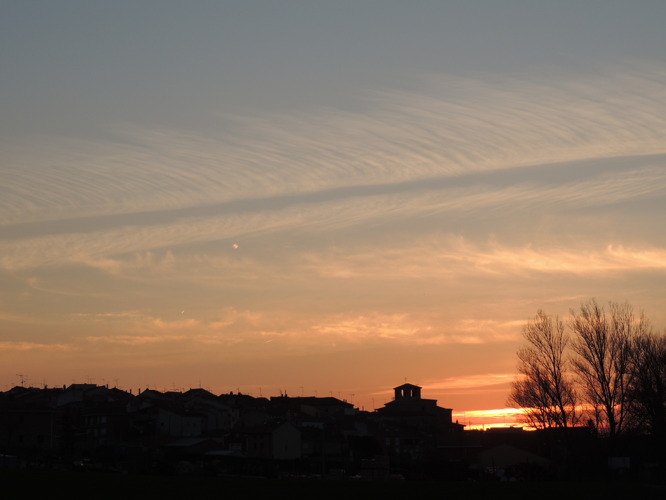 Villafruela (Burgos) Atardecer desde las piscinas